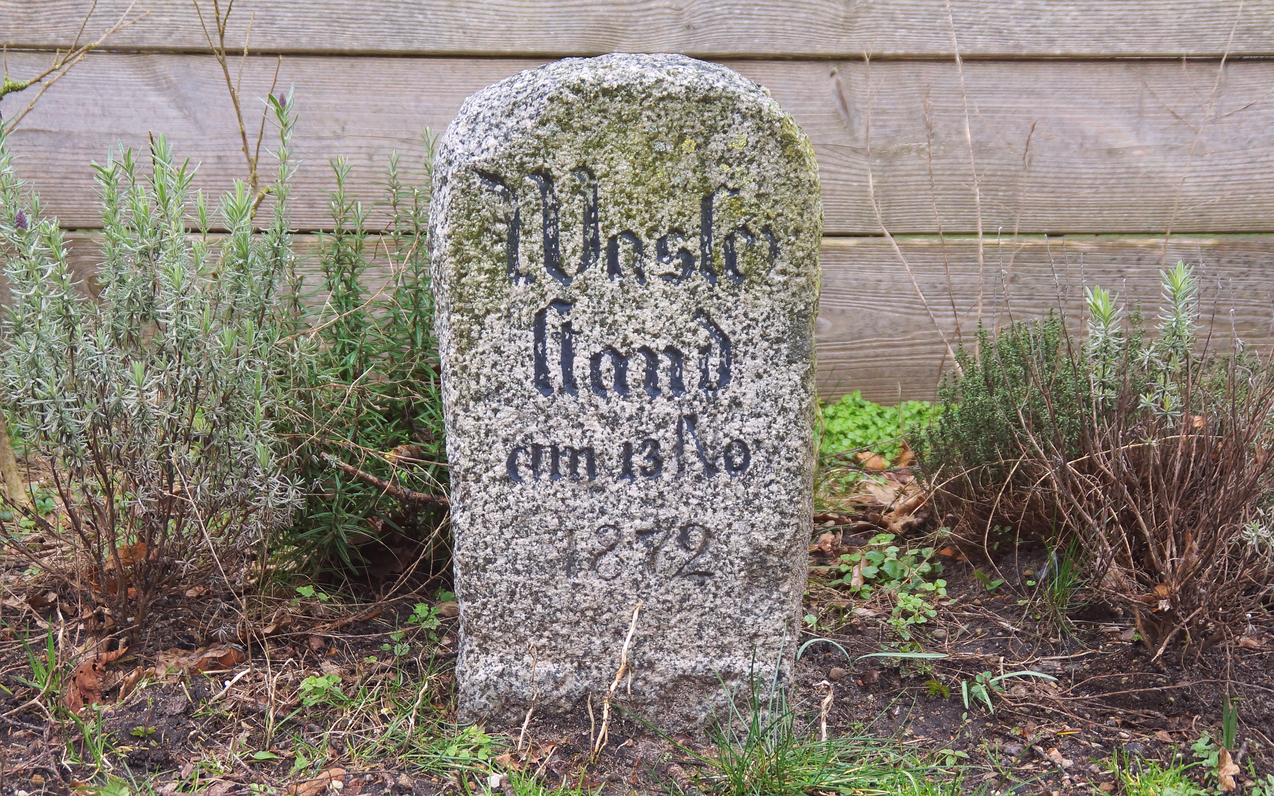 Hochwasserkatastrophe am 13. November 1872 am Haff in Steinberg: Hochwassermarke in Steinberghaff - Foto Wolfgang Pehlemann DSC07413